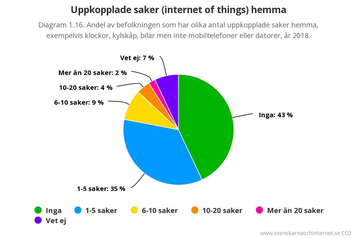 Andel av den svenska befolkningen som har olika antal uppkopplade saker hemma, exempelvis klockor, kylskåp bilar, men inte mobiler eller datorer, år 2018.